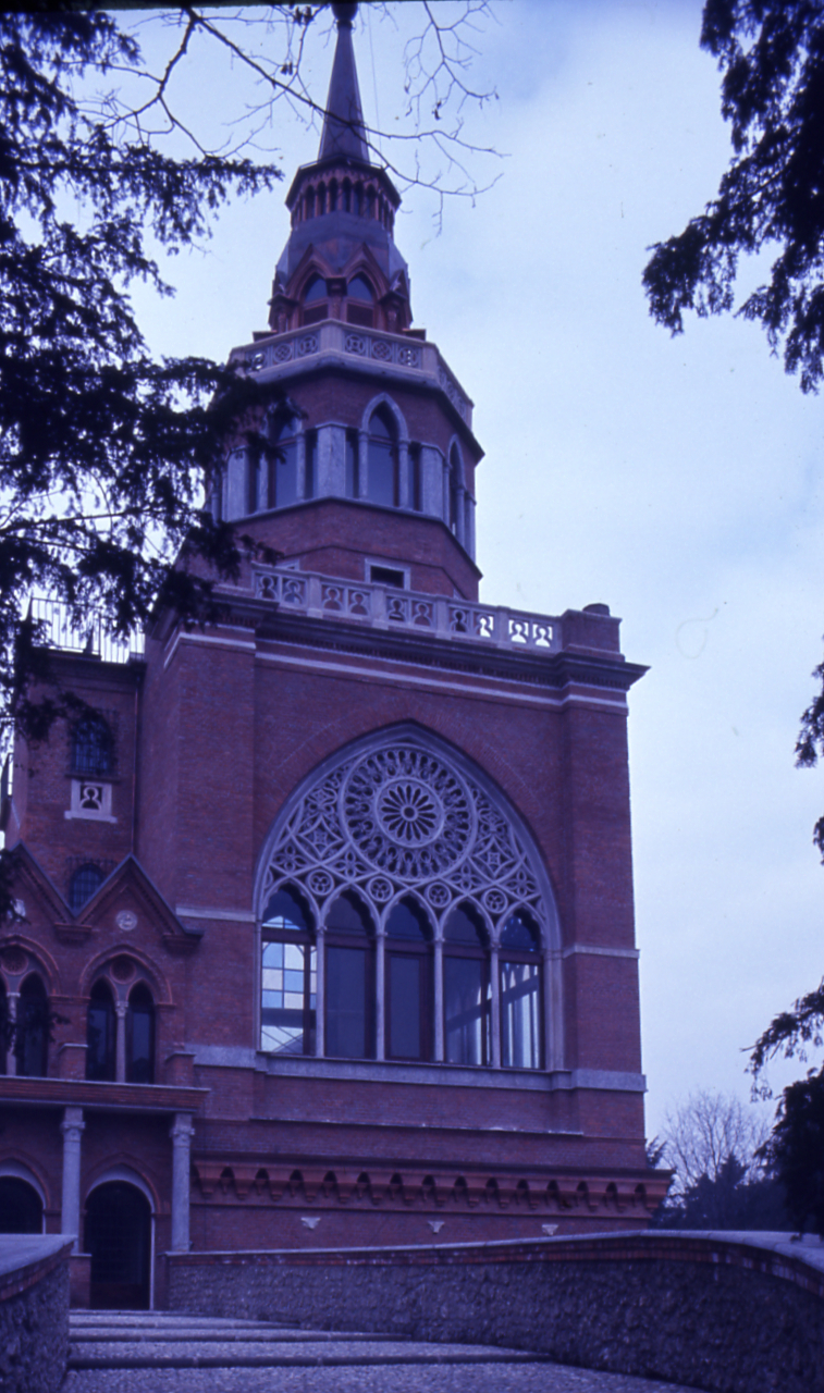 Servizio fotografico : Desio, 1976 / Paolo Monti. - Foglio: 1, Fotogrammi complessivi: 8/20 : Diapositiva, sviluppo cromogeno/ pellicola ; 35 mm. - ((Sullo chassis della diapositiva n.1 Monti specifica: "Palagi Desio". - Le diapositive nn. 09-20 costituiscono un'altra serie. - Occasione: Mostra "Pelagio Palagi artista e collezionista", Museo civico di Bologna e Torino. - Fonte: Agenda di Paolo Monti: Leica 1501-3000 Controllo numerazione (1950-1978), presso Archivio Paolo Monti. - Fonte: Fattura di Paolo Monti: IV. Commesse/ Fattura n. 02/ Museo Civico - Fotografie per mostra Pelagio Palagi (1976/03/03), presso Archivio Paolo Monti. - Fonte: Monografia: Pelagio Pelagi, artista e collezionista, catalogo della mostra, Bologna 1976, Bologna, Grafis Edizioni (1976). - Fonte: Agenda di Paolo Monti: Diapositive 24x36mm (1948-1982), presso Archivio Paolo Monti